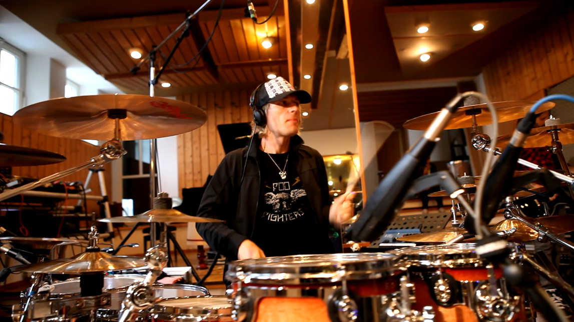 Studio